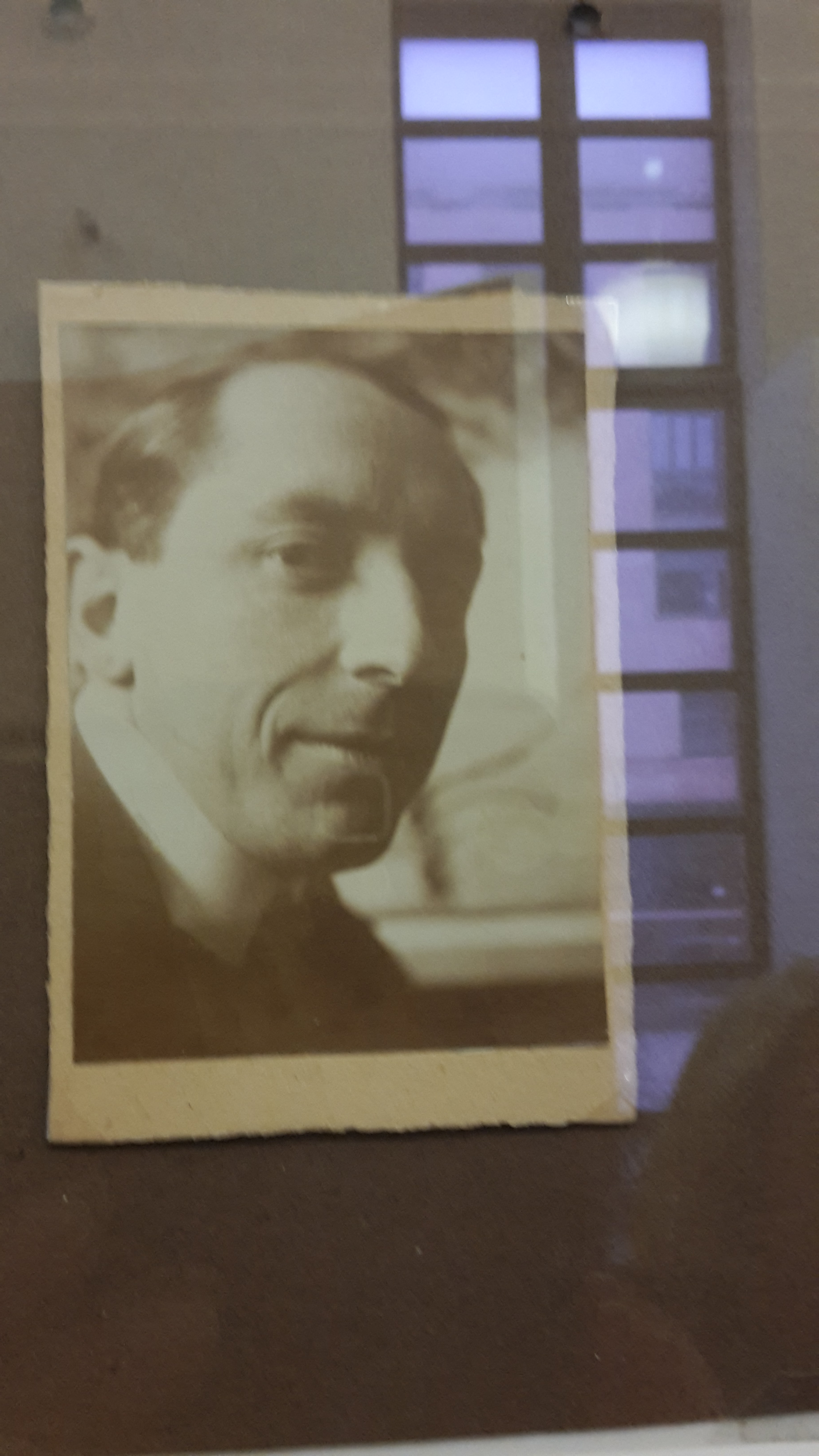 Foto di Felice Casorati conservata al Museo del 900 a Milano.